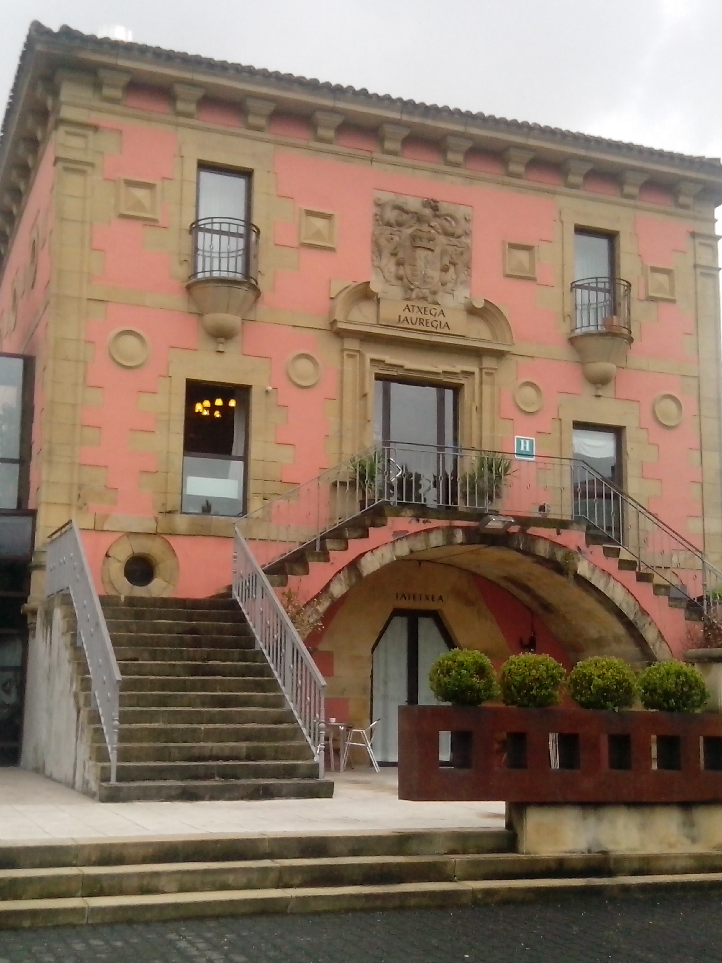 Atxega jauregiaren aurrealdea